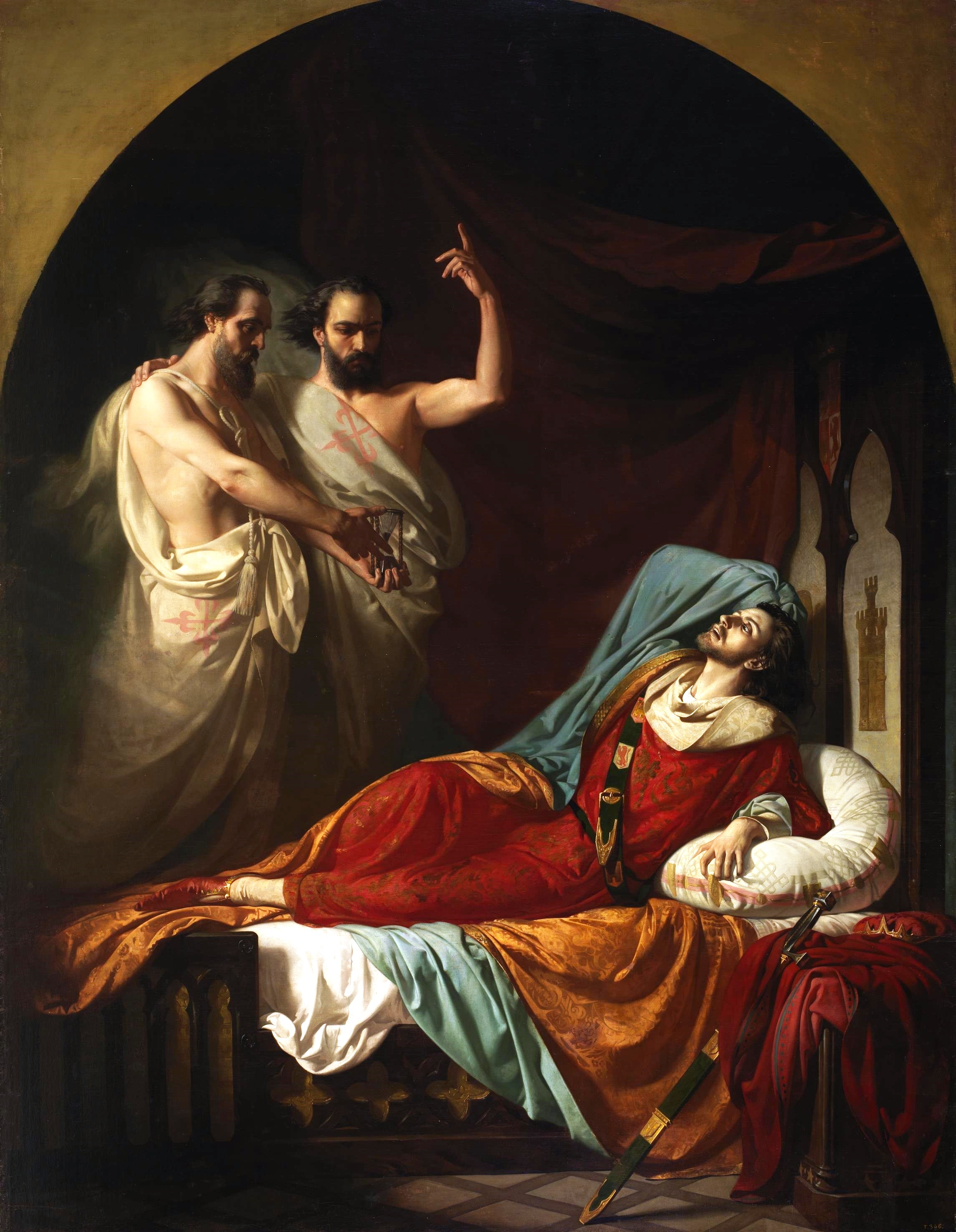 El lienzo representa los últimos momentos de Fernando IV el Emplazado (1285-1312), rey de Castilla y León, que falleció en la ciudad de Jaén el día 7 de septiembre de 1312. Según la leyenda, el rey fue emplazado para comparecer ante Dios por los Hermanos Carvajal, caballeros de la Orden de Calatrava, a los que el monarca había hecho arrojar, introducidos en una jaula de hierro con puntas afiladas en su interior, desde la cumbre de la Peña de Martos, situada en la provincia de Jaén. El monarca, según refiere la Crónica de Fernando IV, así como la Crónica de Alfonso XI, falleció treinta días después de que los hermanos Carvajal fueran ejecutados, cumpliéndose así el plazo que ambos le habían impuesto, de que comparecería ante Dios al cabo de treinta días.